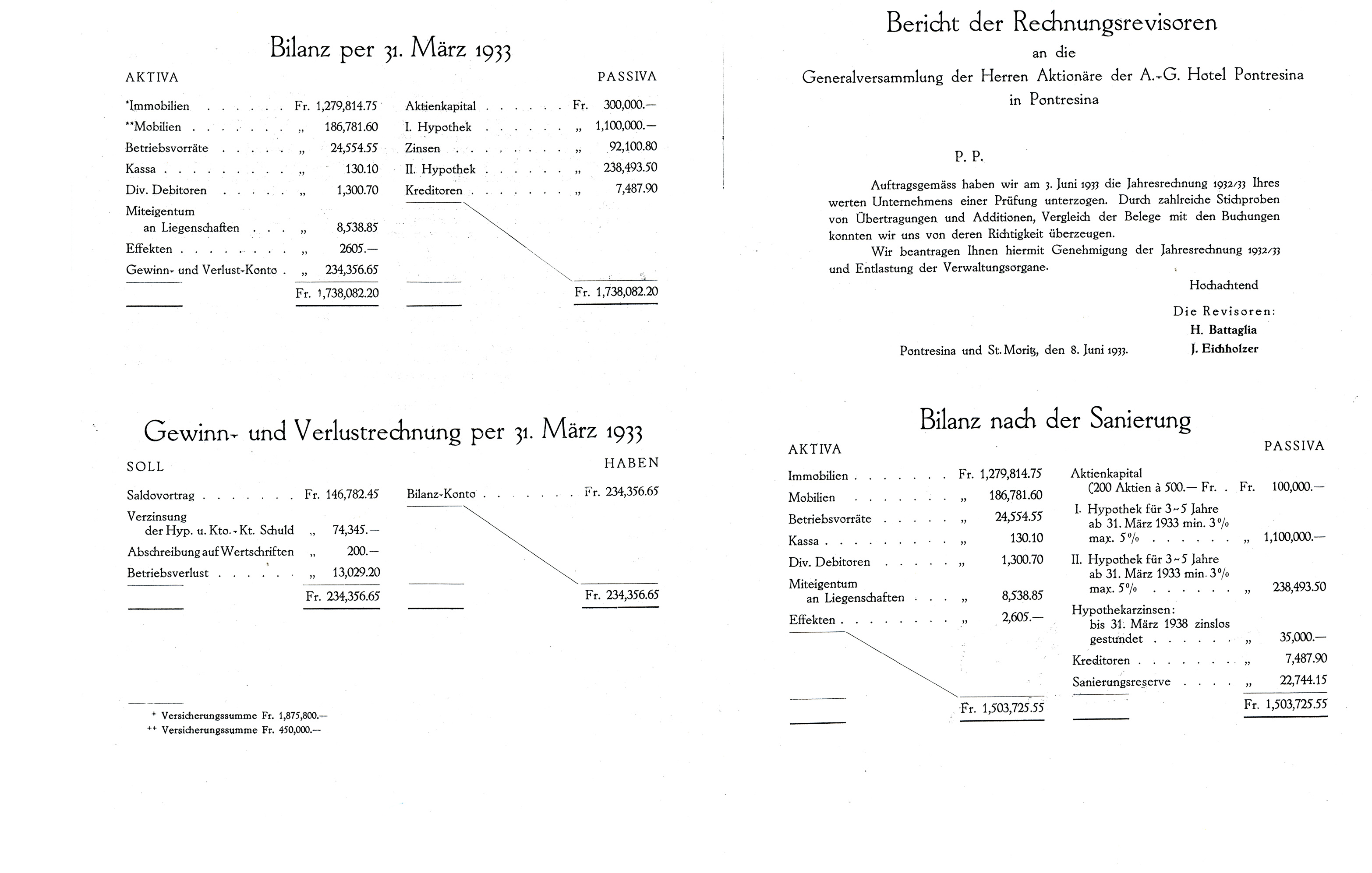 Hotel Pontresina: Geschäftsbericht Saison 1932/33 mit der Sanierungsbilanz